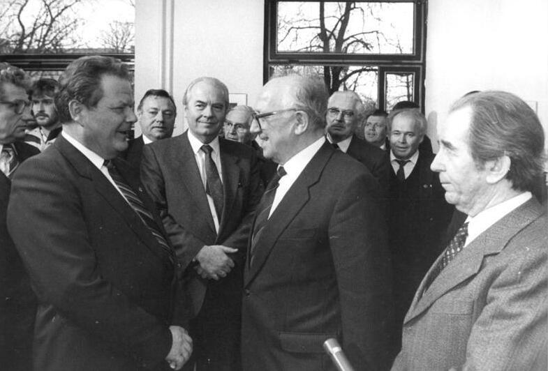 ADN-ZB/Koard-26.2.1986 BRD: Besuch VK-Delegation Der Präsident der Volkskammer der DDR, Stellvertreter des Vorsitzenden des Staatsrates und Mitglied des Politbüros des ZK der SED, Horst Sindermann, hielt sich an der Spitze einer Delegation der Volkskammer der DDR vom 19. - 22.2.86 in der BRD auf. Er folgte damit einer Einladung des Vorsitzenden der Fraktion der SPD im Bundestag, Dr. Hans-Jochen Vogel, die anläßlich eines Besuches einer von Prof. Dr. Horst Ehmke geleiteten Delegation der SPD-Bundestagsfraktion bei der Volkskammer im März 1984 ausgesprochen worden war. UBz: Begegnung Horst Sindermanns (2.v.r.) mit dem Vorsitzenden der DKP, Herbert Mies (l.) in der Bonner Vertretung des DKP-Parteivorstandes (1.v.r. Hermann Gautier, stellvertretender Vorsitzender der DKP) am 21.1.